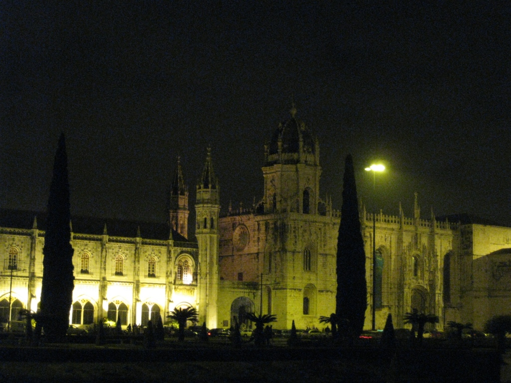 Ժերոնիմուսի վանական համալիրը գիշերով